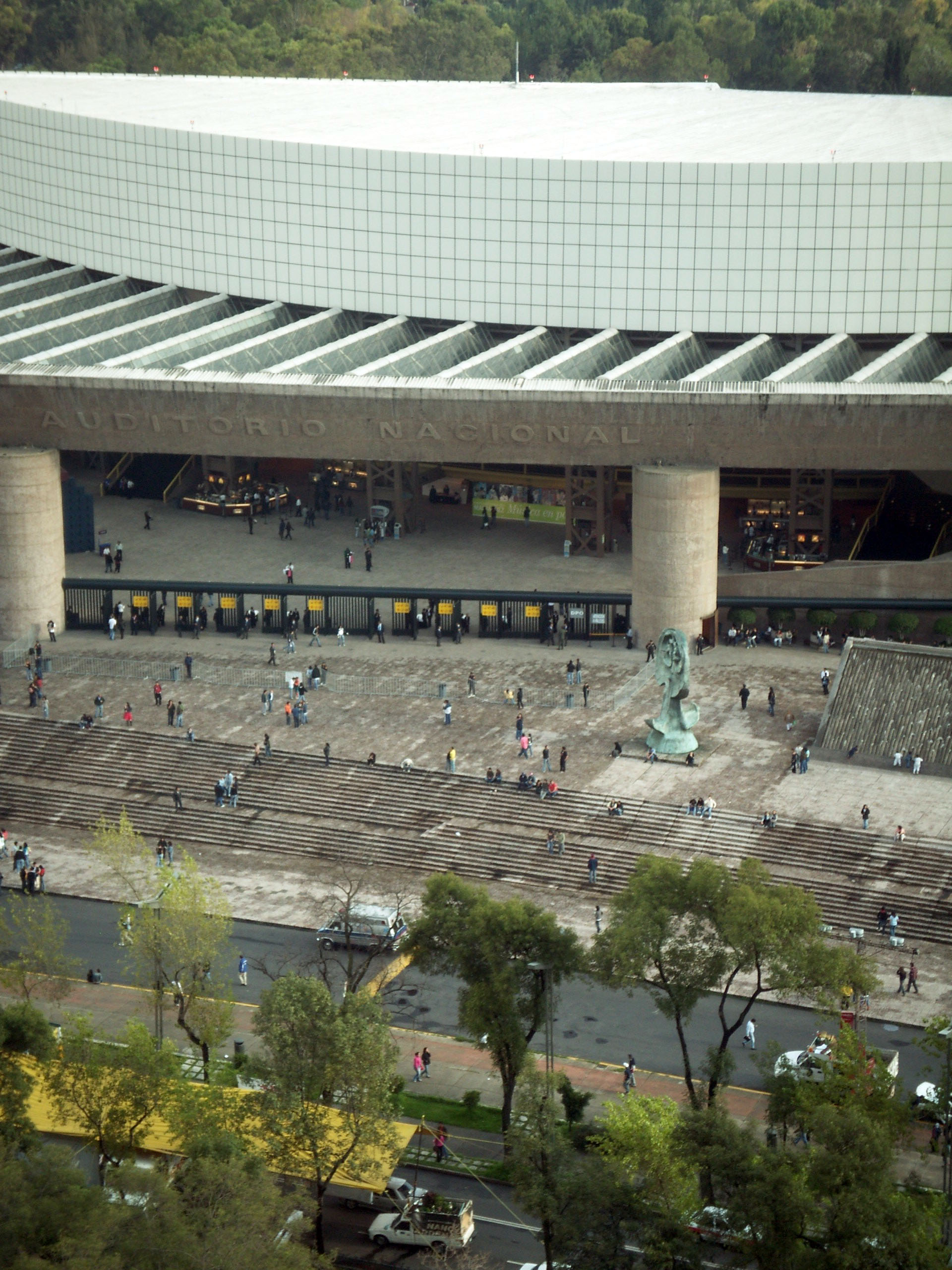 Auditorio Nacional